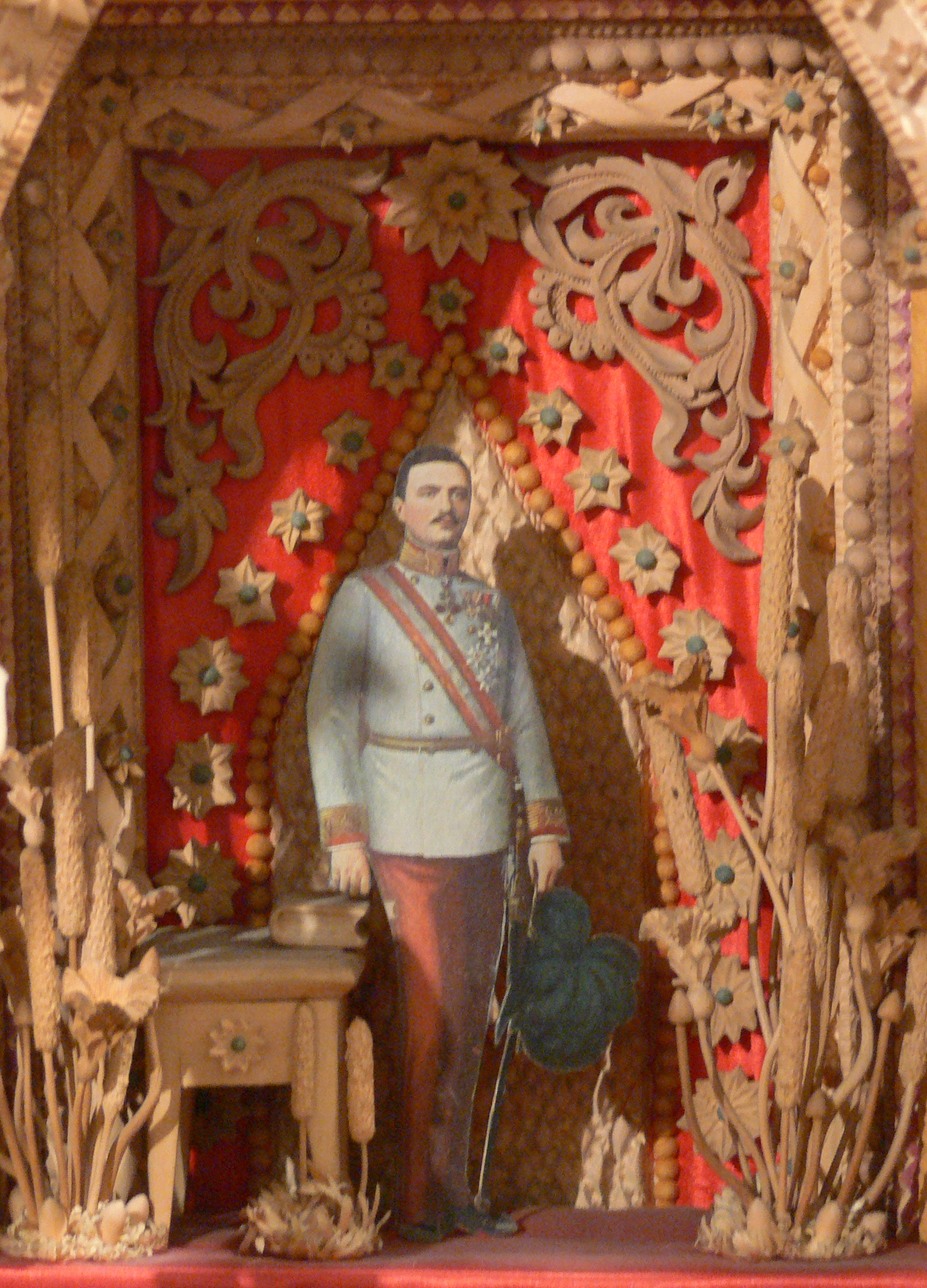 Monumentales Kleinkunstwerk aus Lindenholz, Ungarn, wohl zur Thronerhebung Kaiser Karls I. 1916; Detail: Karl I. Wien, Österreichisches Museum für Volkskunde; ÖMV-Inv.nr. 76/295